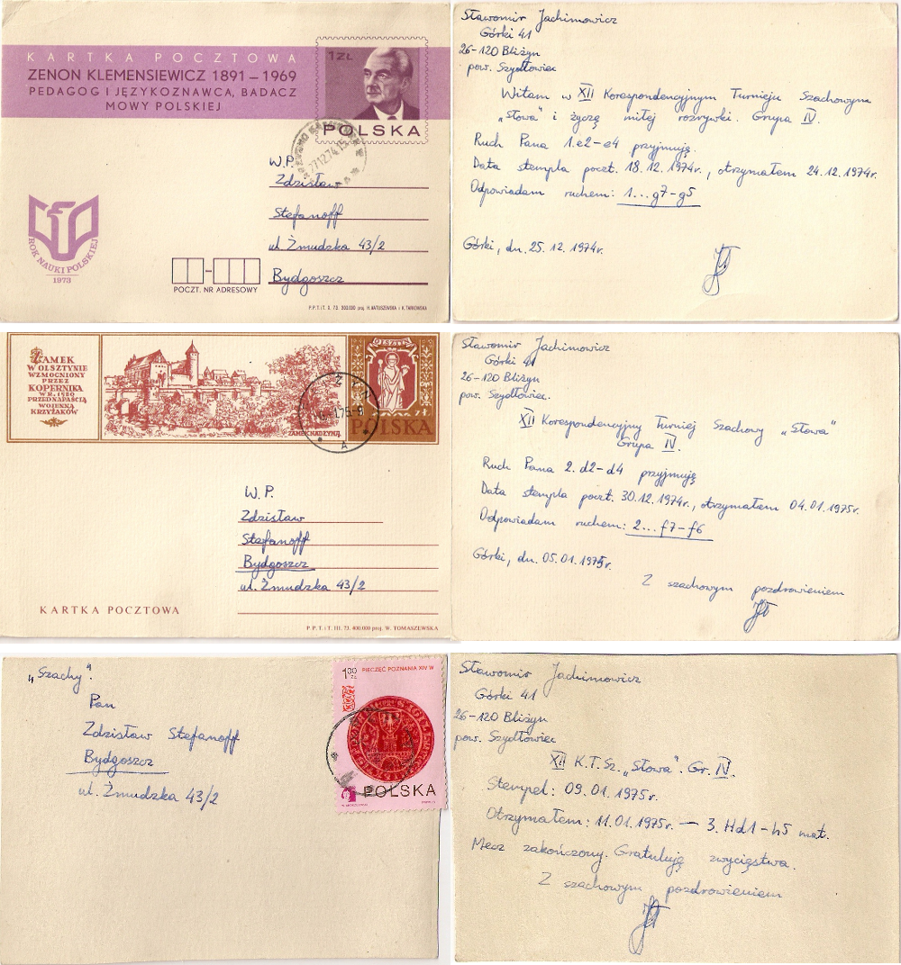 Najszybsza partia rozegrana w historii szachów korespondencyjnych. W trzecim posunięciu białe zamatowały czarne. Partia została rozegrana w XII Turnieju korespondencyjnym gazety „Słowo Powszechne”. Turniej rozgrywany był w sezonie 1974/75. Białymi grał Zdzisław Stefanoff, uczeń sportowego Liceum Ogólnokształcącego w Bydgoszczy, a czarnymi Sławomir Jachimowicz z Górek (powiat Szydlowiec). Jest to najszybszy mat teoretyczny, jaki można osiągnąć białymi.